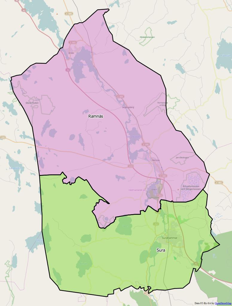 Distriktsindelningen i Surahammars kommun World file: 58.81313292190017705 0 0 -58.81313292190017705 1772497.9330625468865037 8381543.27494112309068441